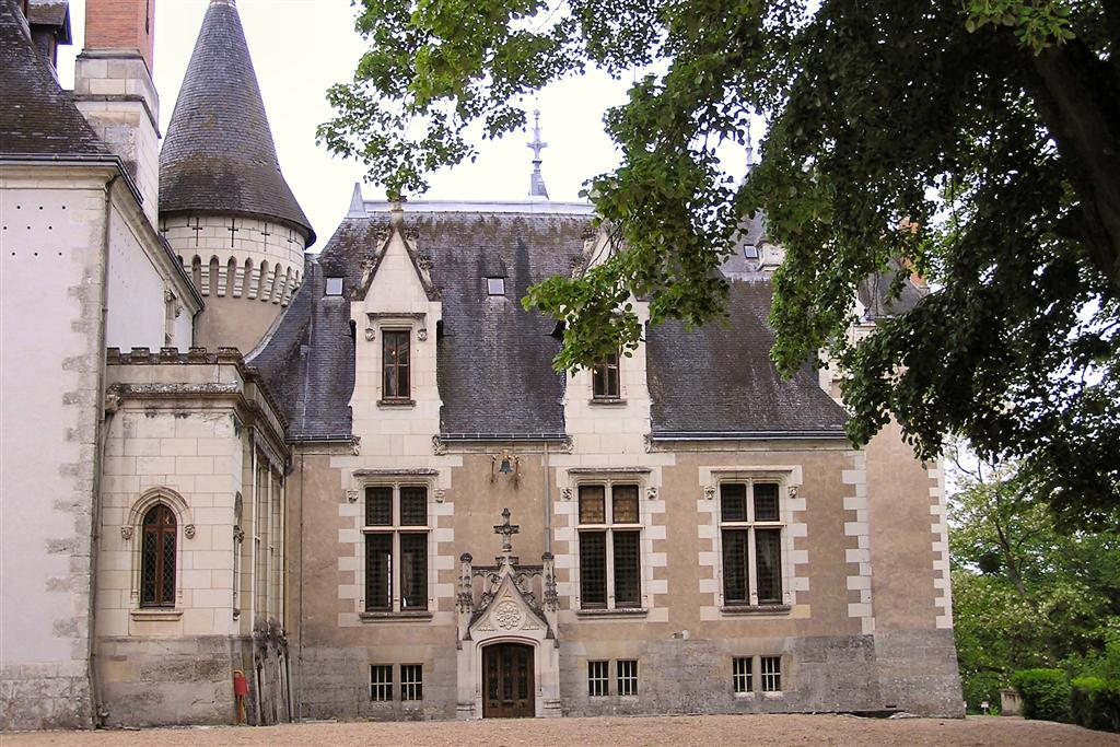 château de candé (Touraine)